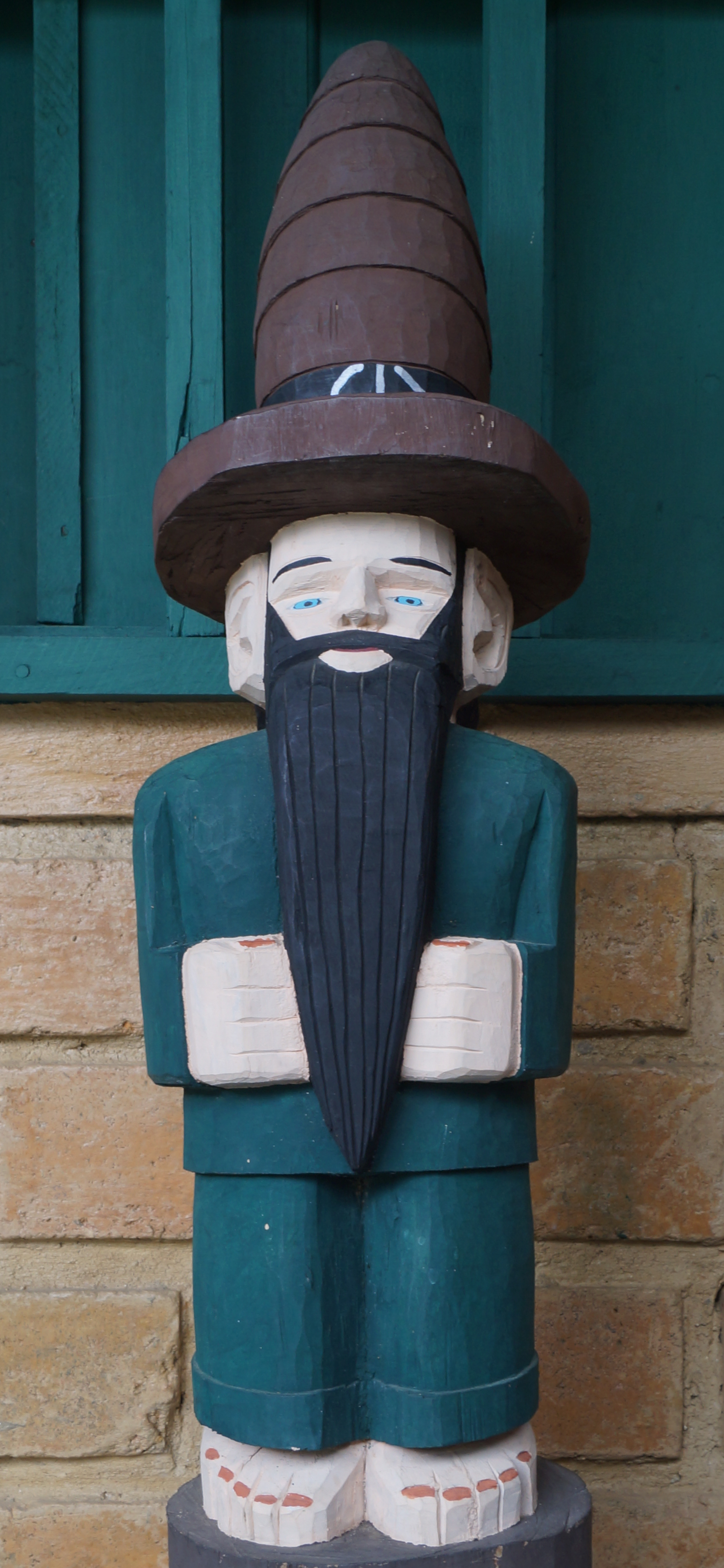 Son unos duendes del folklore venezolano, habitantes de la zona andina desde tiempos precolombinos.Habitan las zonas de Mérida y Trujillo, especialmente sus lagunas y ríos. Se les describe como criaturas benignas, traviesas, y defensoras del medio ambiente.